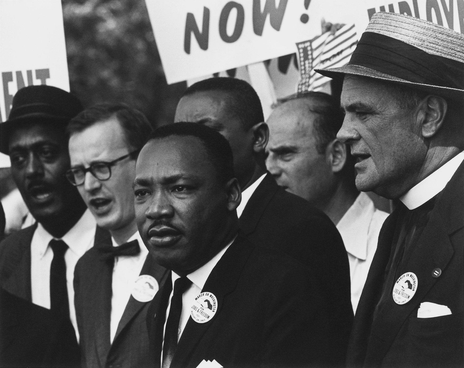 تصویری از مارتین لوتر کینگ در روز راهپیمایی به سوی واشینگتن برای کار و آزادی. سخنرانی ۱۷ دقیقه‌ای وی در این راهپیمایی به نام «من رؤیایی دارم» شهرت بالایی دارد.